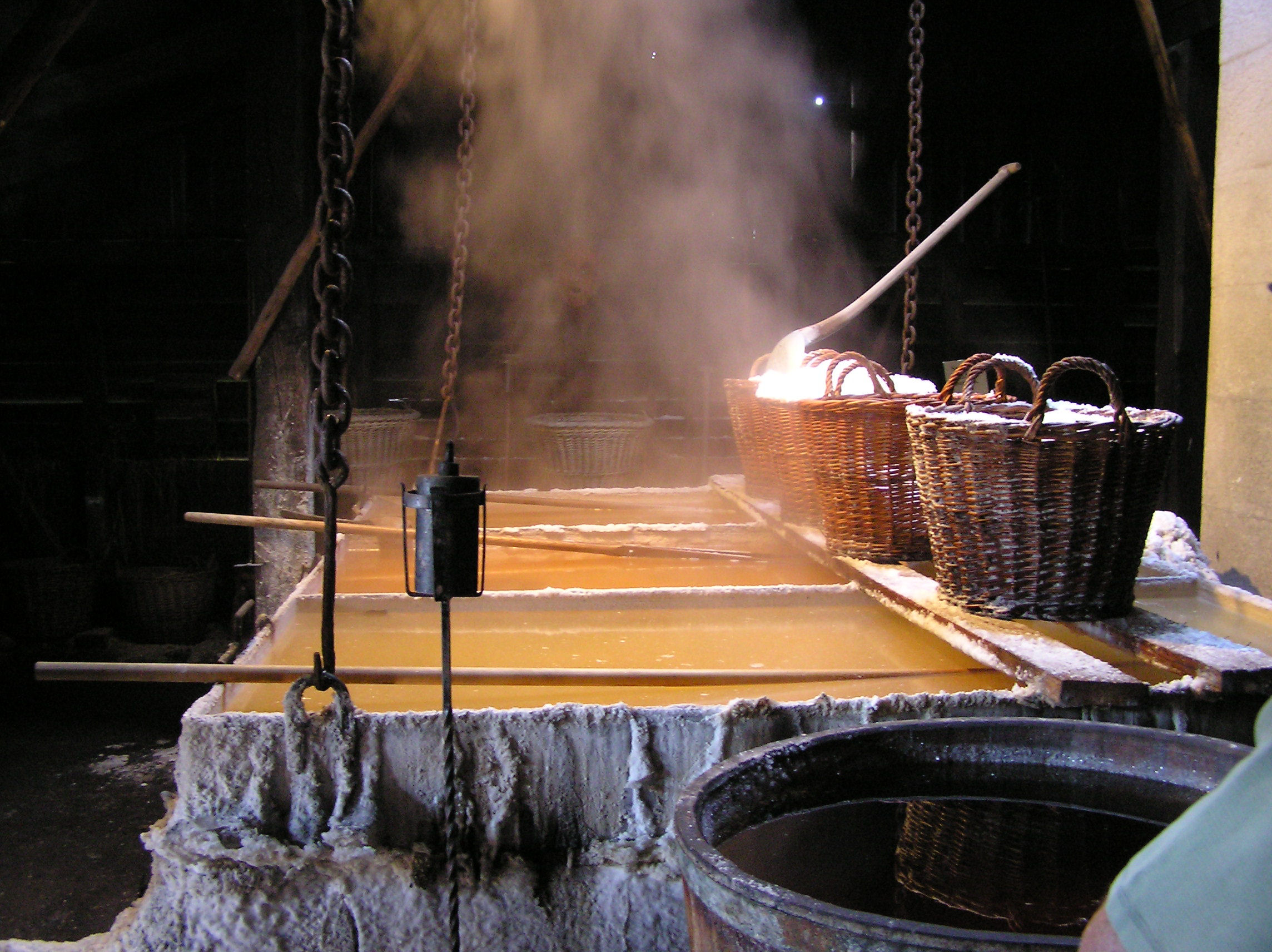 Læsø,Saltsydning